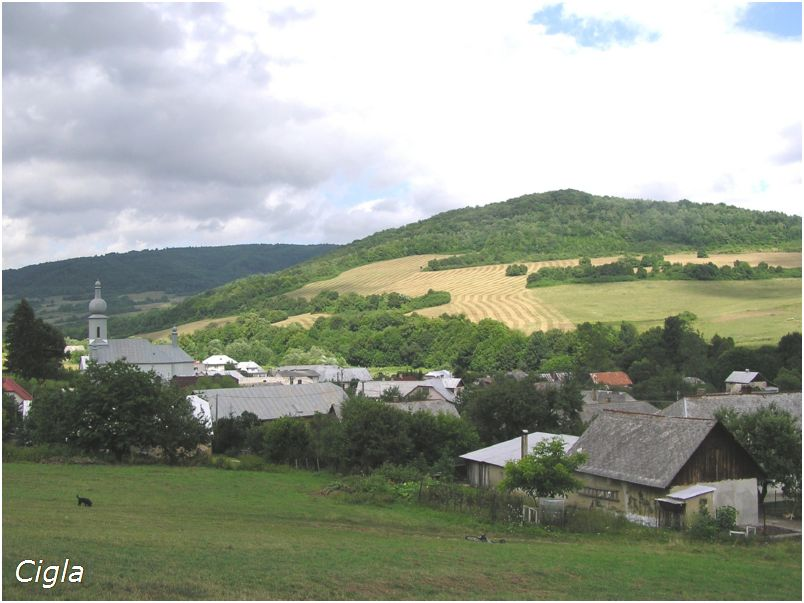 Celkový pohľad na Ciglu